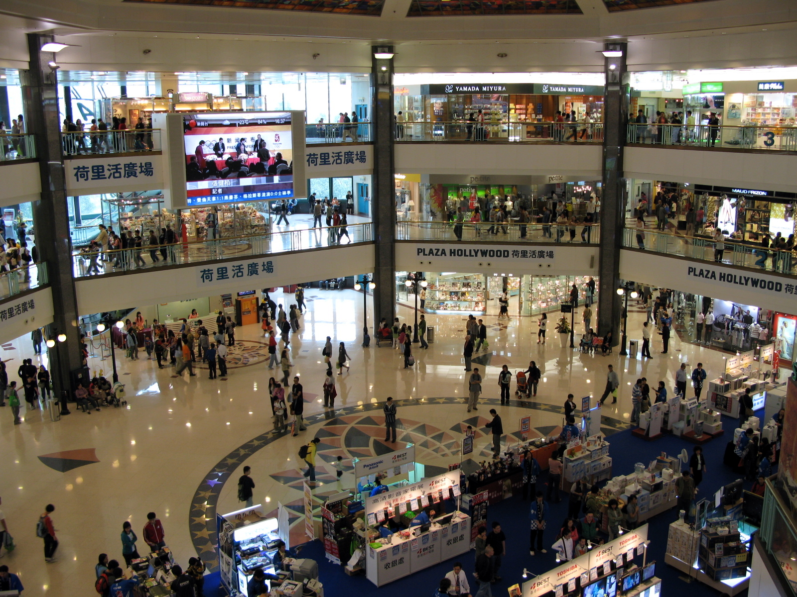 荷里活廣場中庭 HK Plaza Hollywood Void